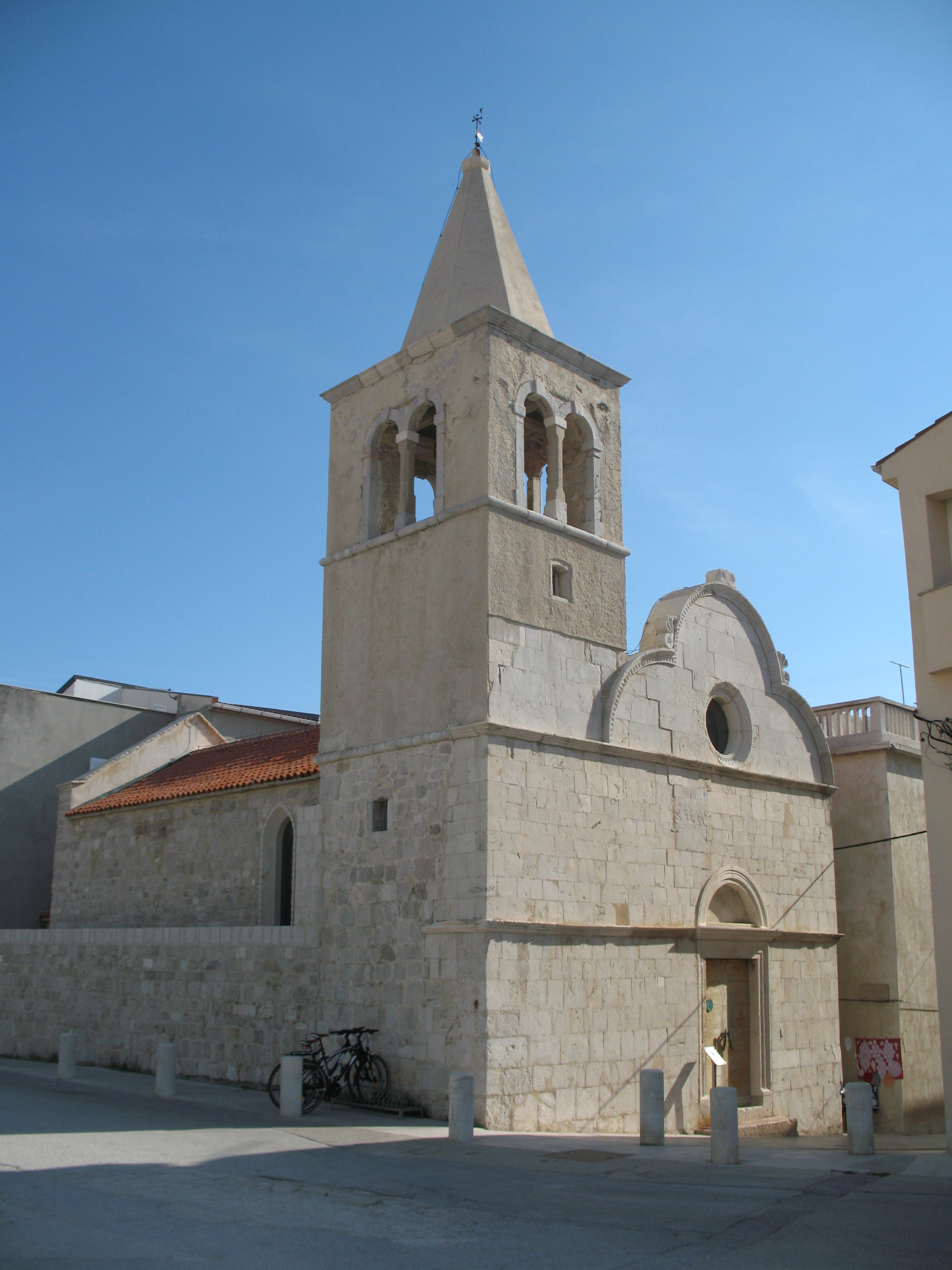 Pag város